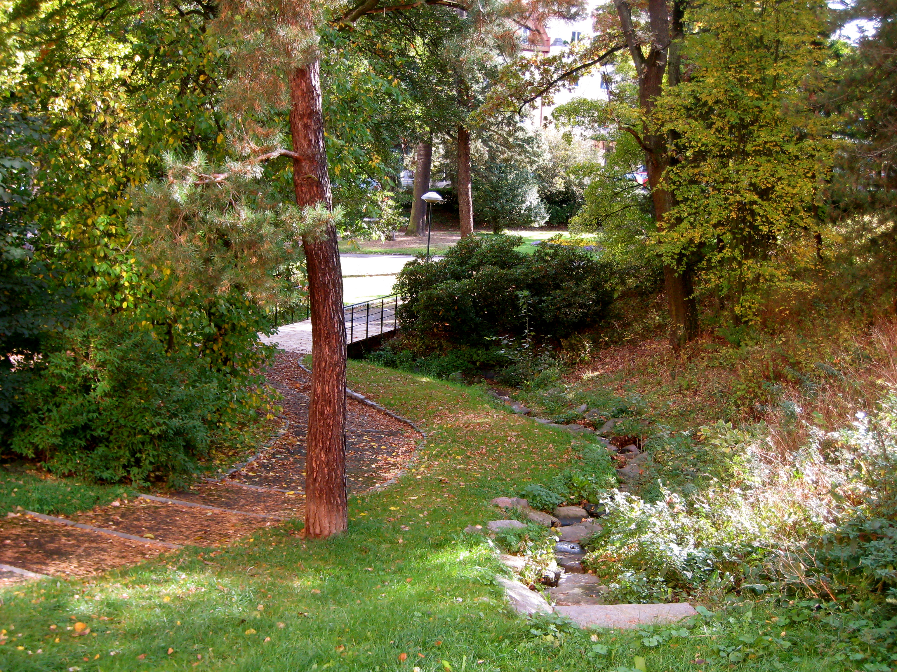 Solparken i Råsunda. På bilden syns den nya bäck som anlades i början på 2000-talet och som leder dagvatten från Råsundavägen ned till en ny damm.